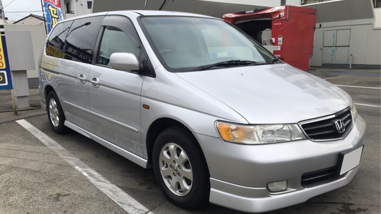 スターライトシルバーメタリック。 純正エアロ装着車